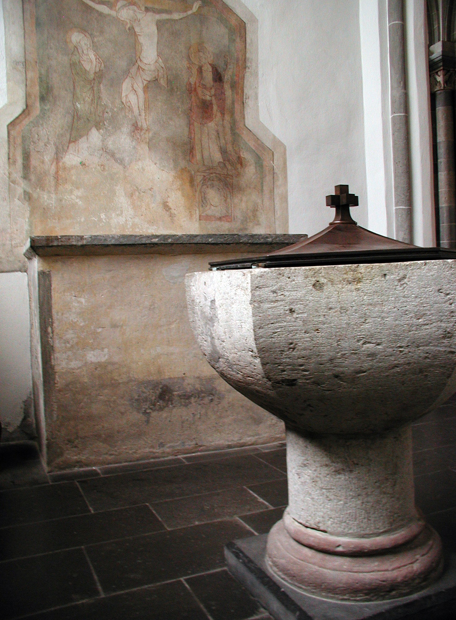 Köln, St. Andreas, Taufbecken (Anfang 13. Jahrhundert lt. Dehio) vor Fresko